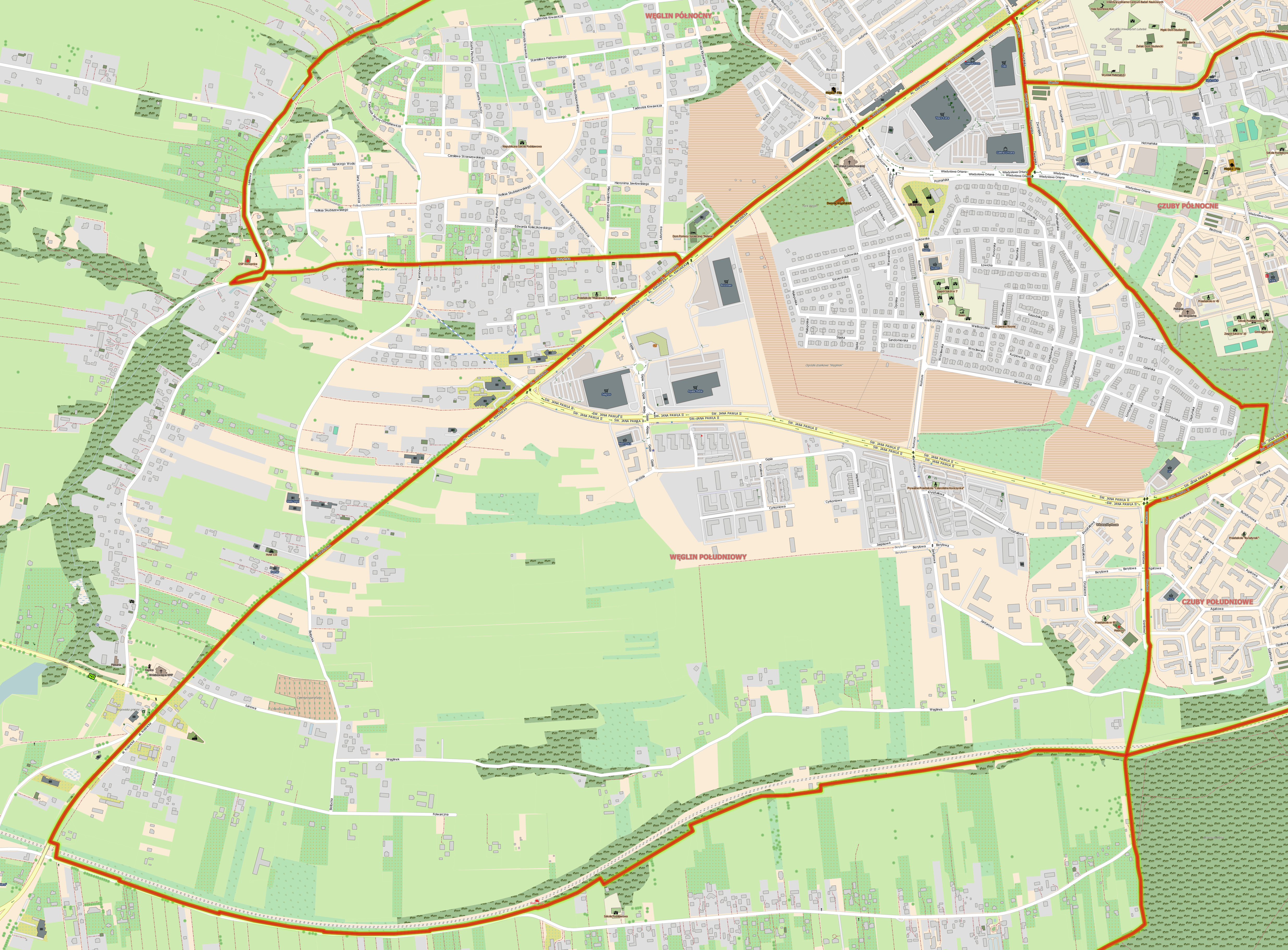 Plan dzielnicy Węglin Południowy w Lublinie.